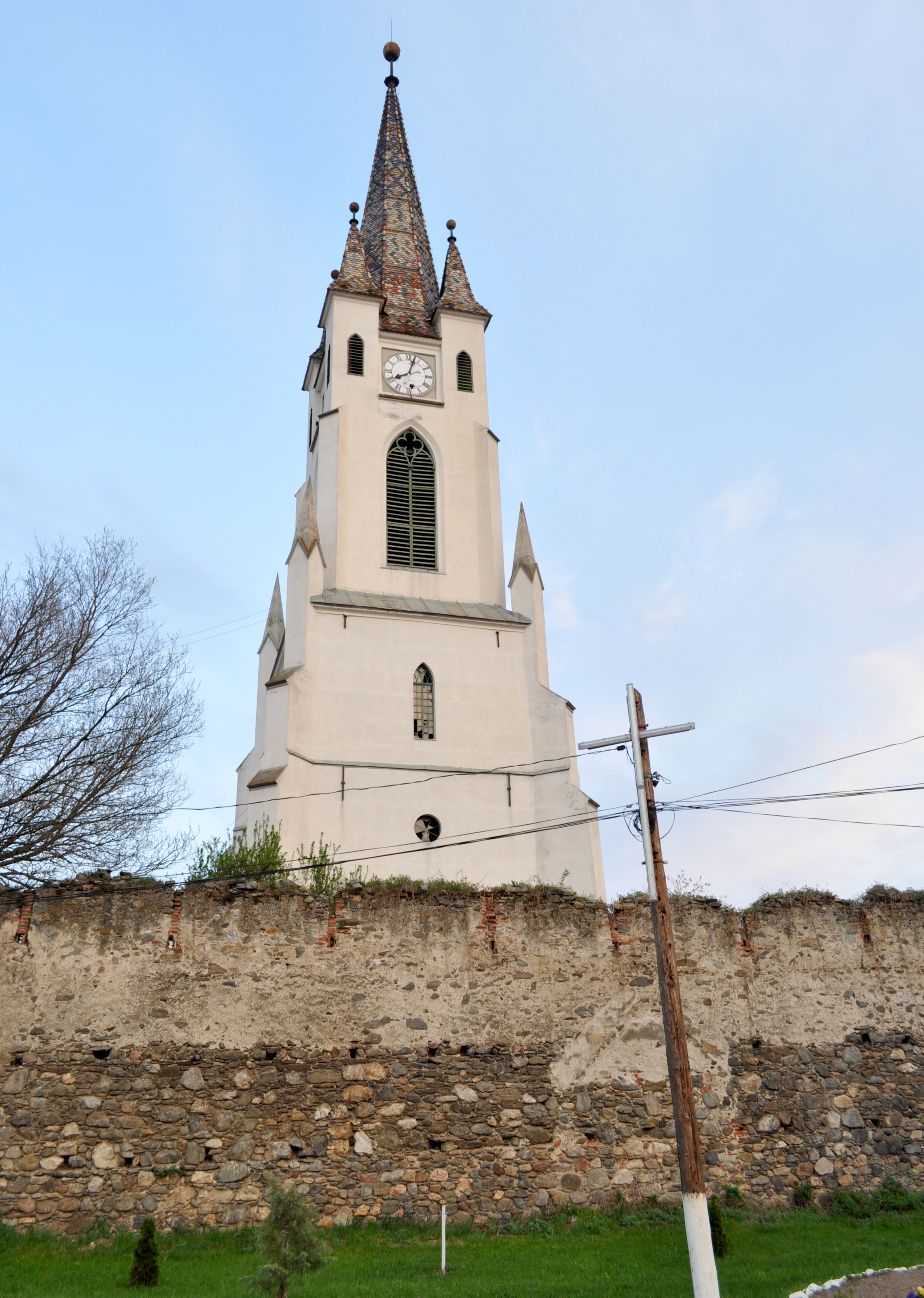 Cetatea medievală, Gârbova, județul Alba